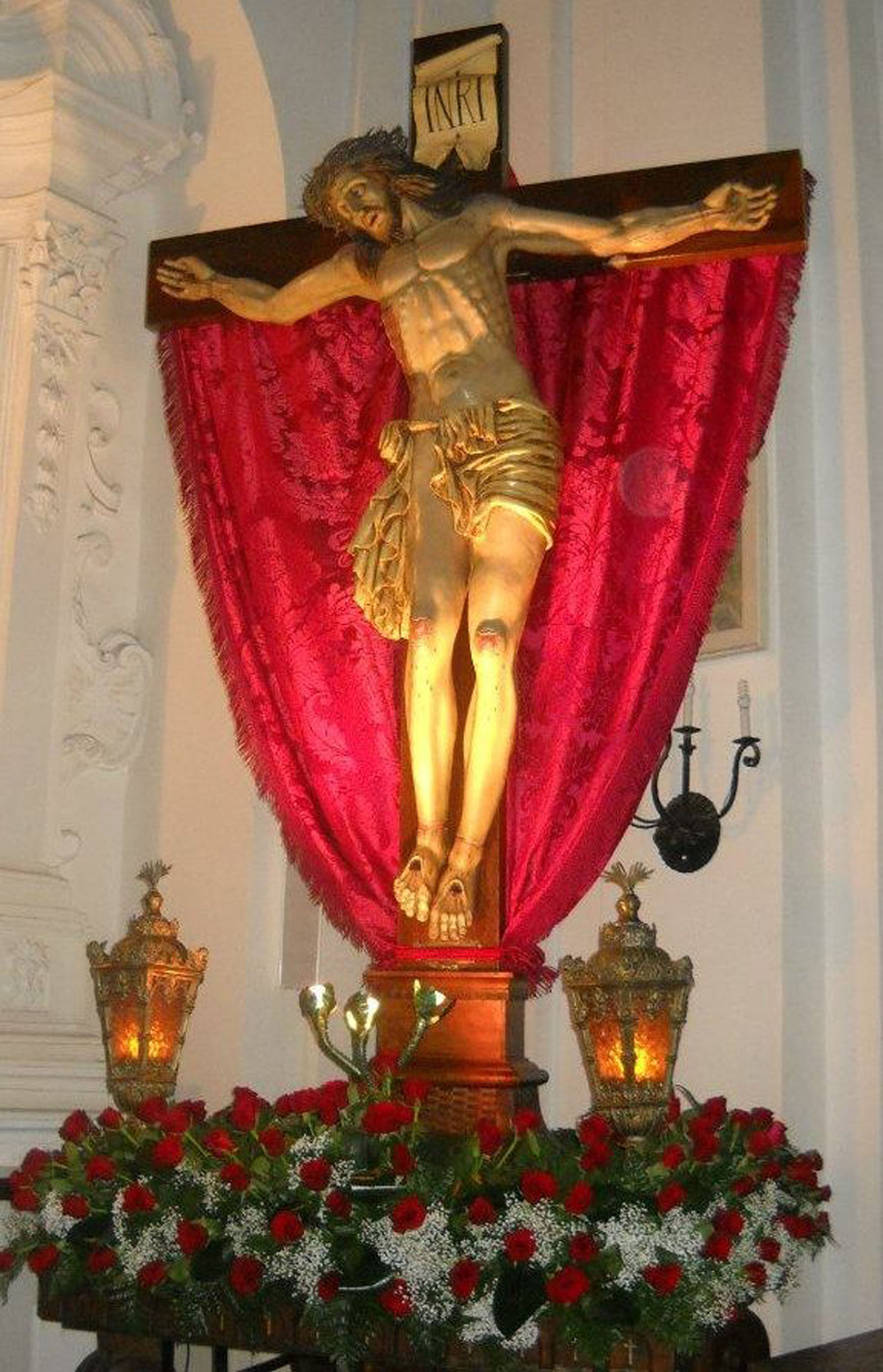 Vara con il Santissimo Crocifisso, in occasione dei festeggiamenti del 3 maggio, all'interno dell'omonima chiesa di Palmi.